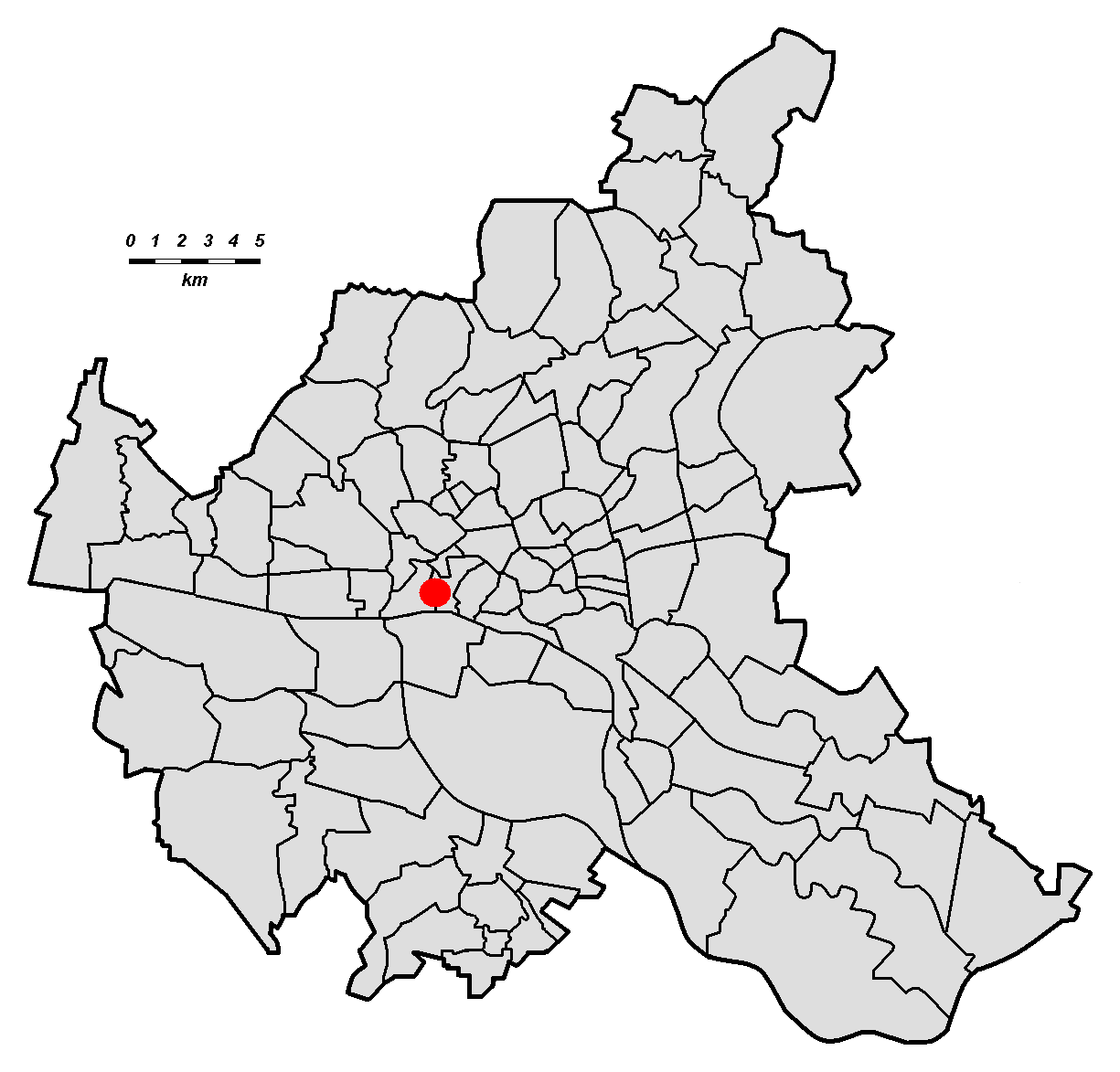 Lage des Beatles-Platzes in Hamburg